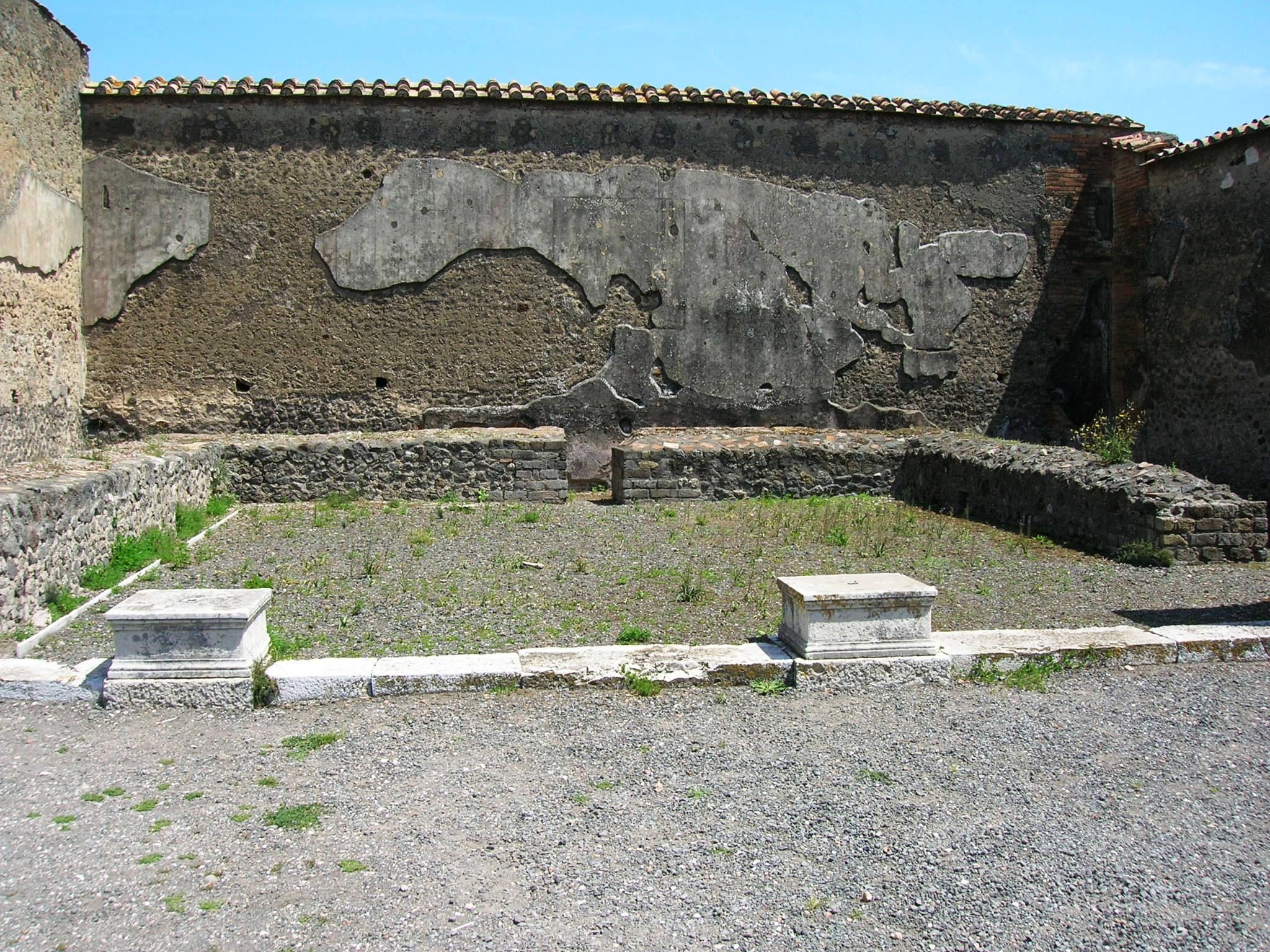 Il Macellum